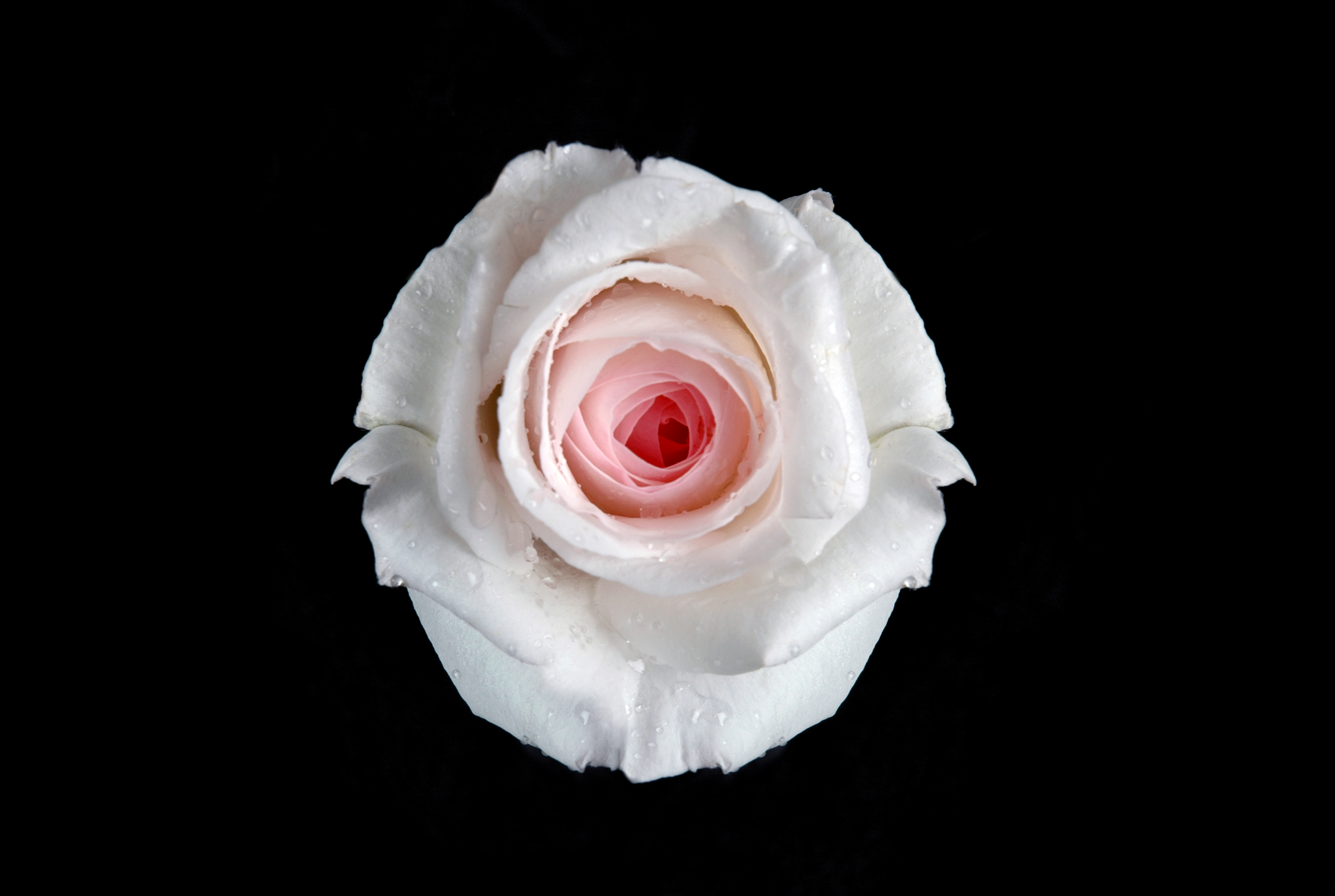 Rosa 'Belmonte'